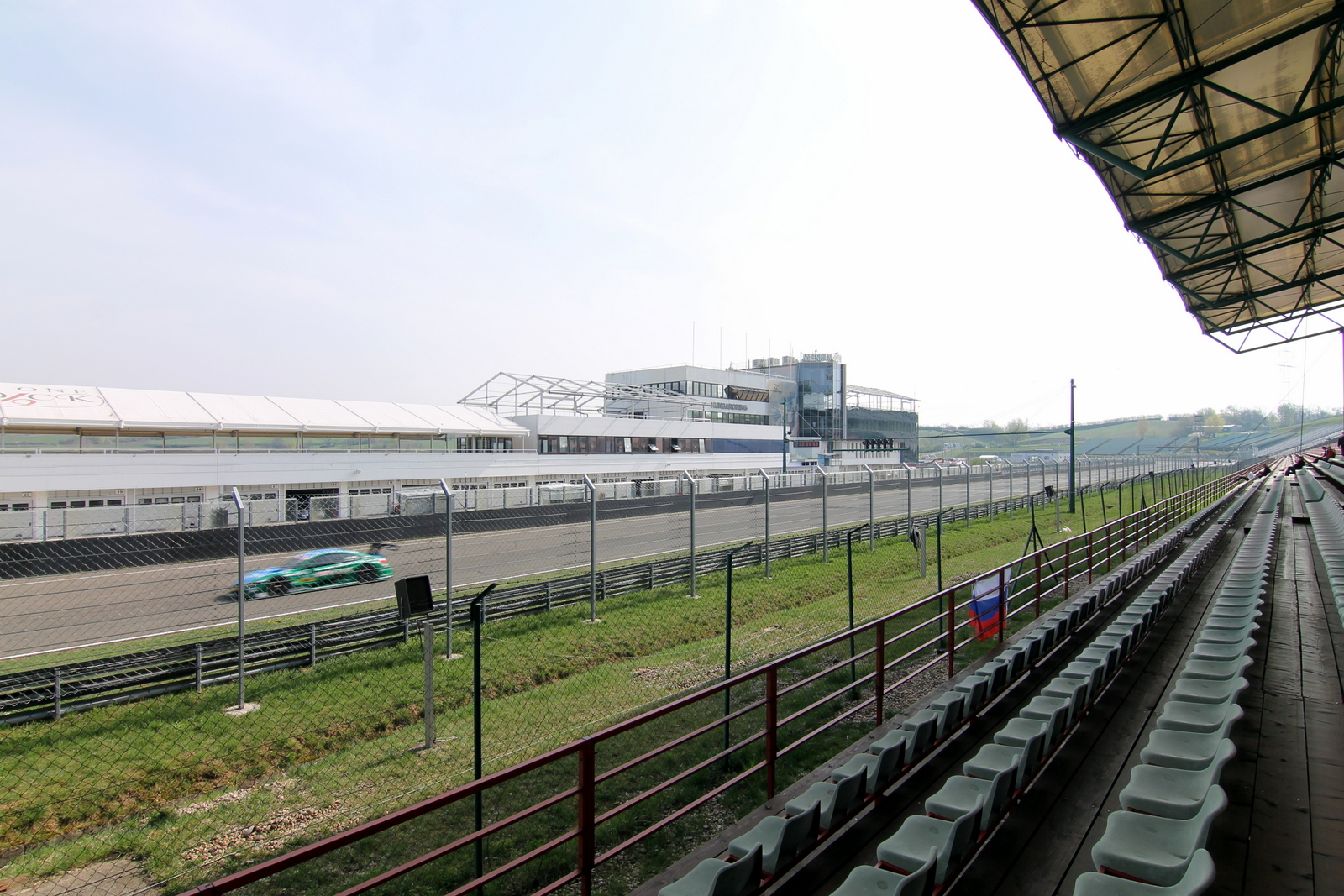 IMG_2407DTM